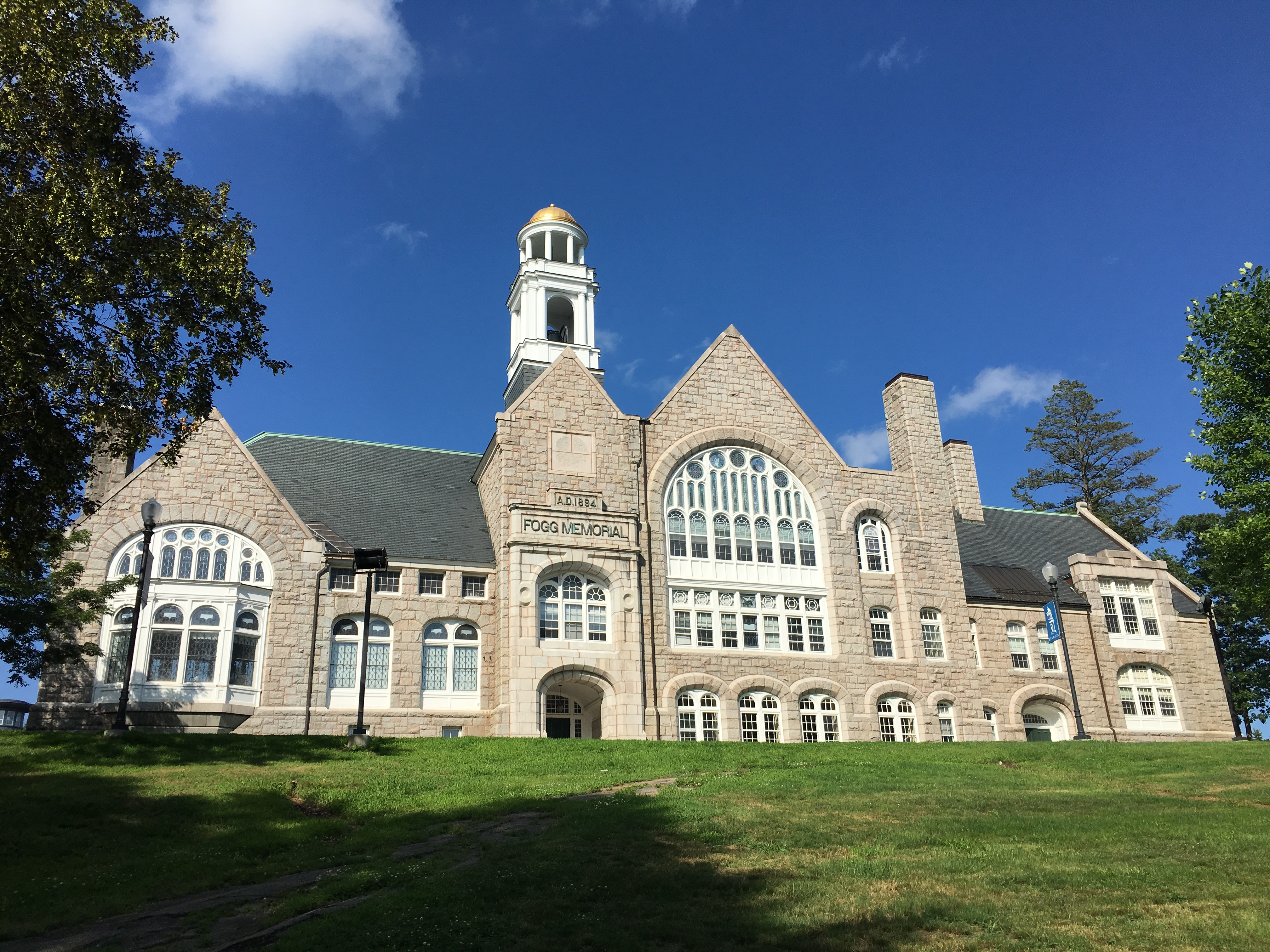 Fogg Memorial Building, Berwick Academy, South Berwick, Maine